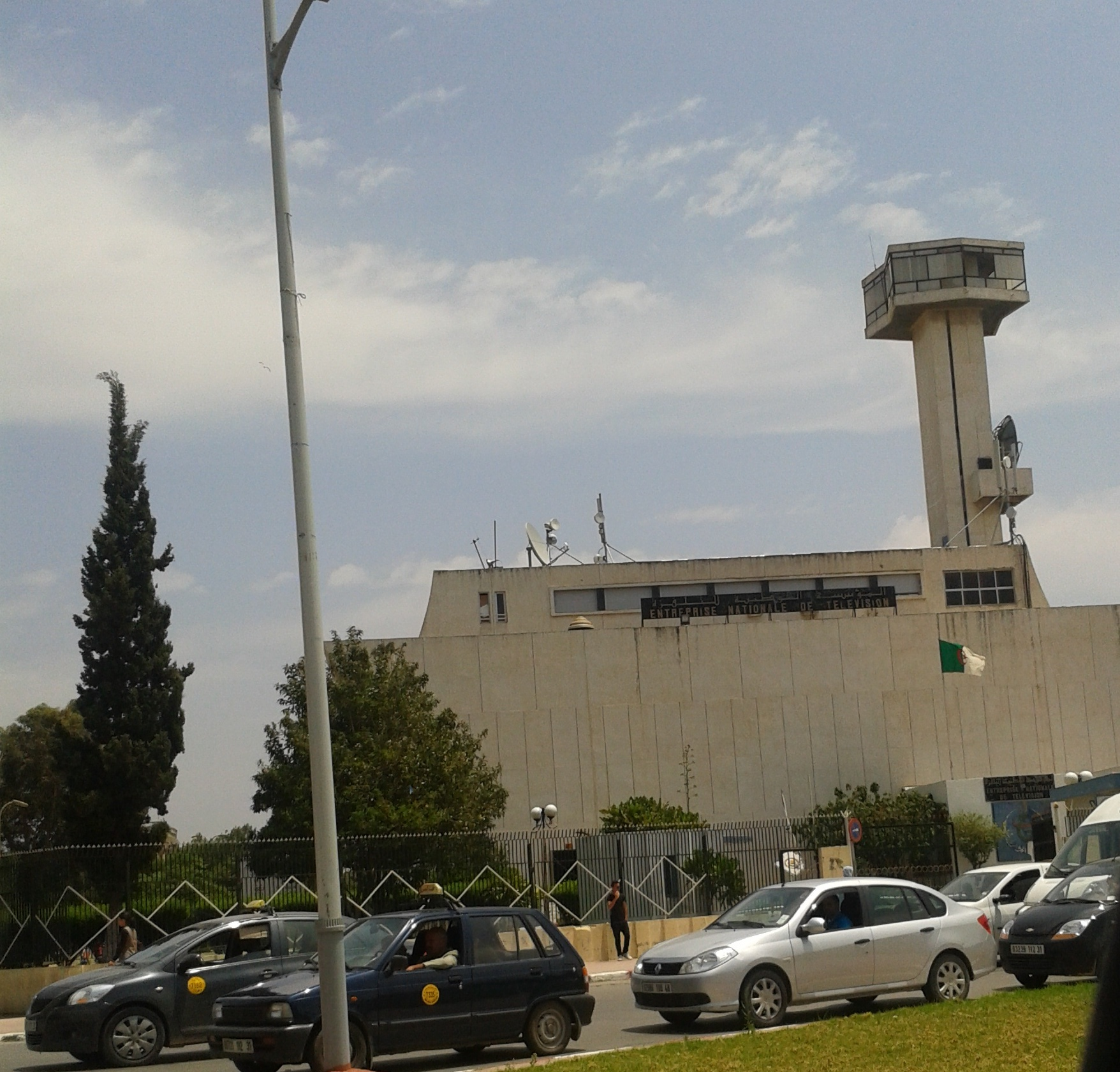 المحطة الجهوية لتلفزيون الجزائري بوهران